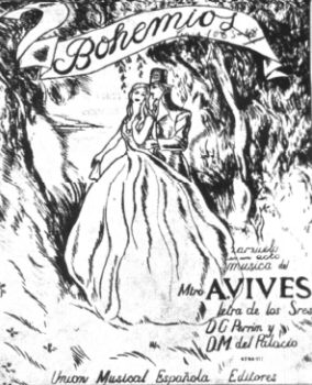 Poster de la sarsuela Bohemios